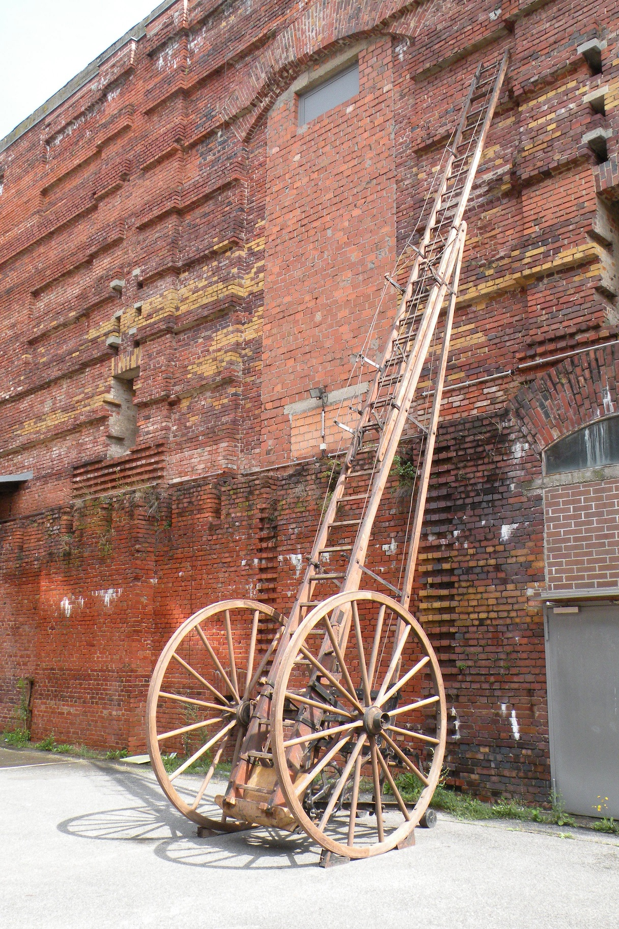 Balaceleiter der FFW Unterfarnbach